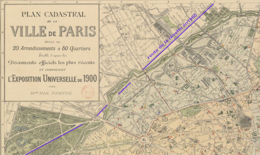 Plan cadastral de la ville de Paris... / établi d'après les documents officiels les plus récentes et comprenant l'Exposition universelle de 1900, par Mme Max Mabyre ajouté en superposition tracé route de la révolte